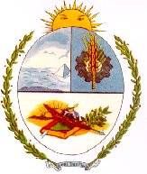 Escudo de General San Martin